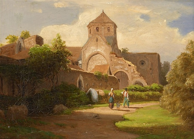 Ansicht einer Klosterruine, Öl auf Leinwand, 15 x 22 cm